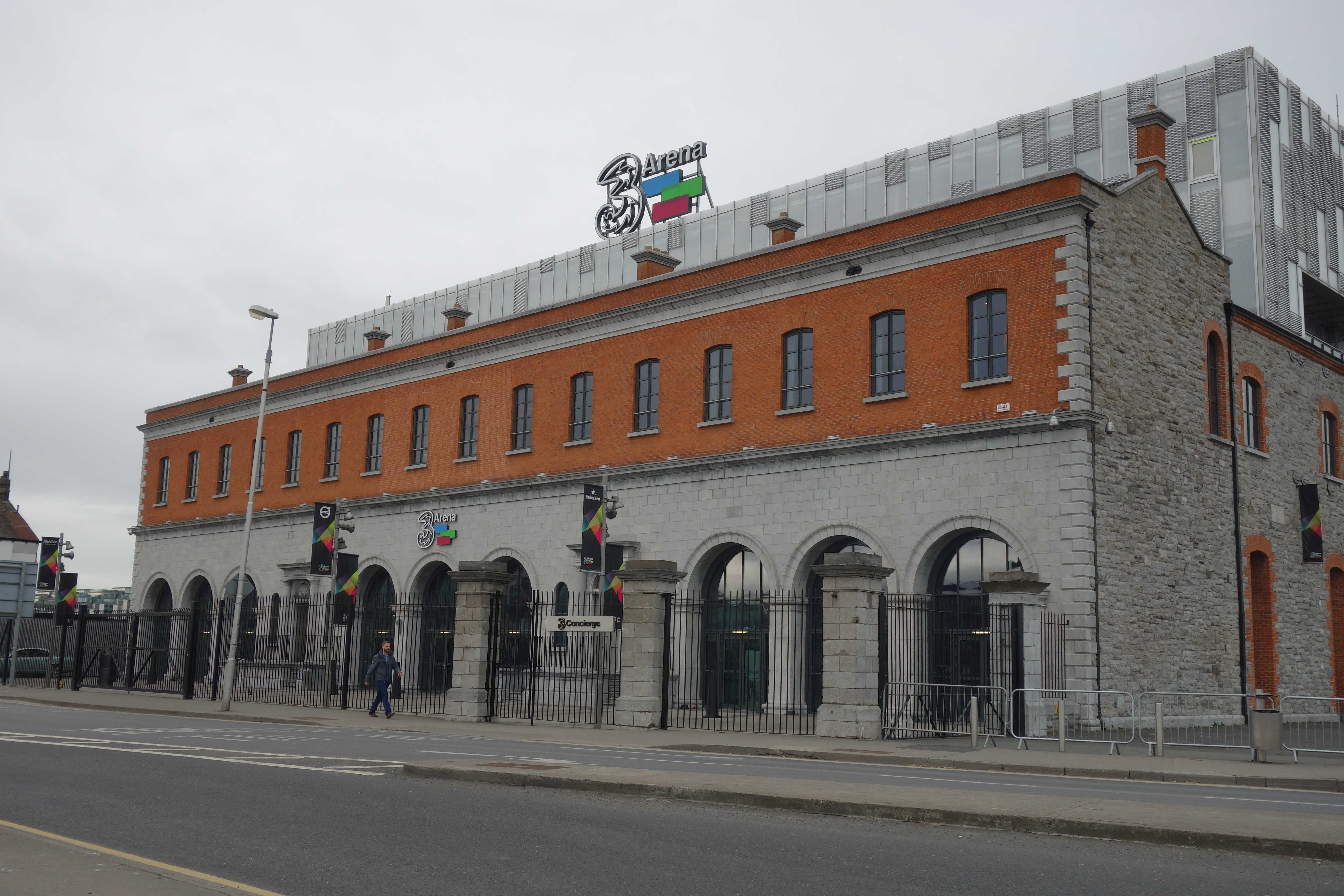 3 Arena Front, Dublin Docklands